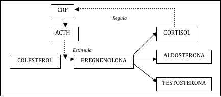 Síntesis hormonas esteroideas